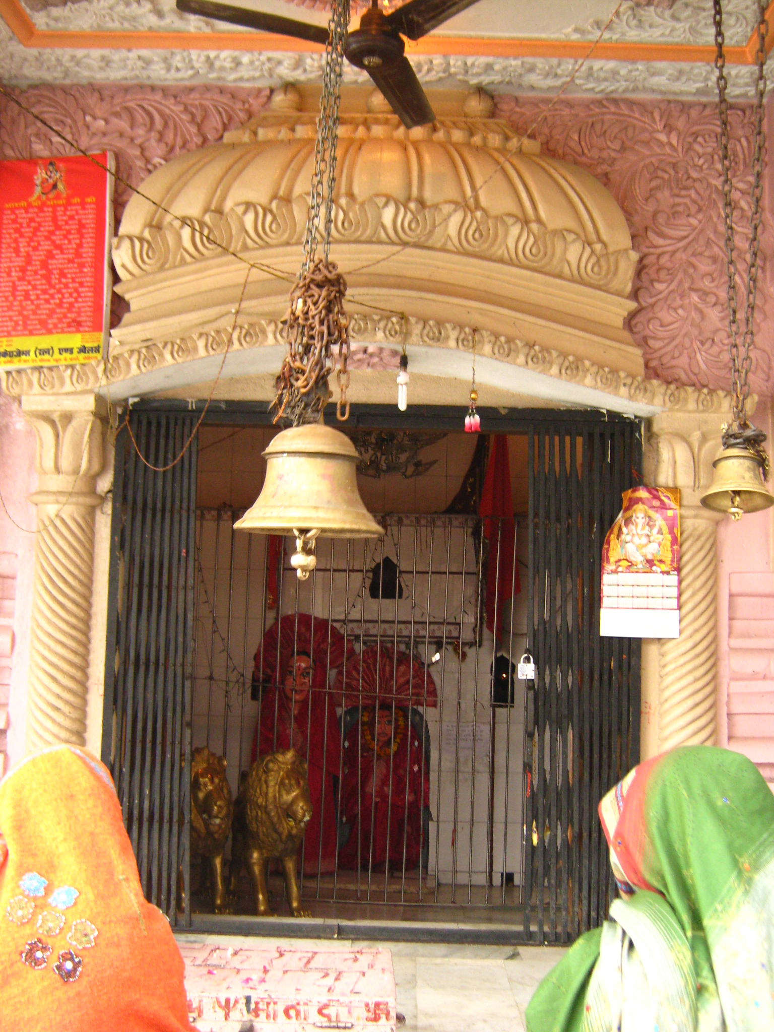 मोदीनगर, गाज़ियाबाद में सीकरी कलां ग्राम स्थित महामाया मन्दिर। इस मन्दिर की स्थानीय लोगों में बहुत मान्यता है। चित्र में सीकरी की देवी दृश्य हैं।